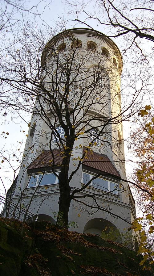 Der Taurasteinturm im Burgstädter Wettinhain